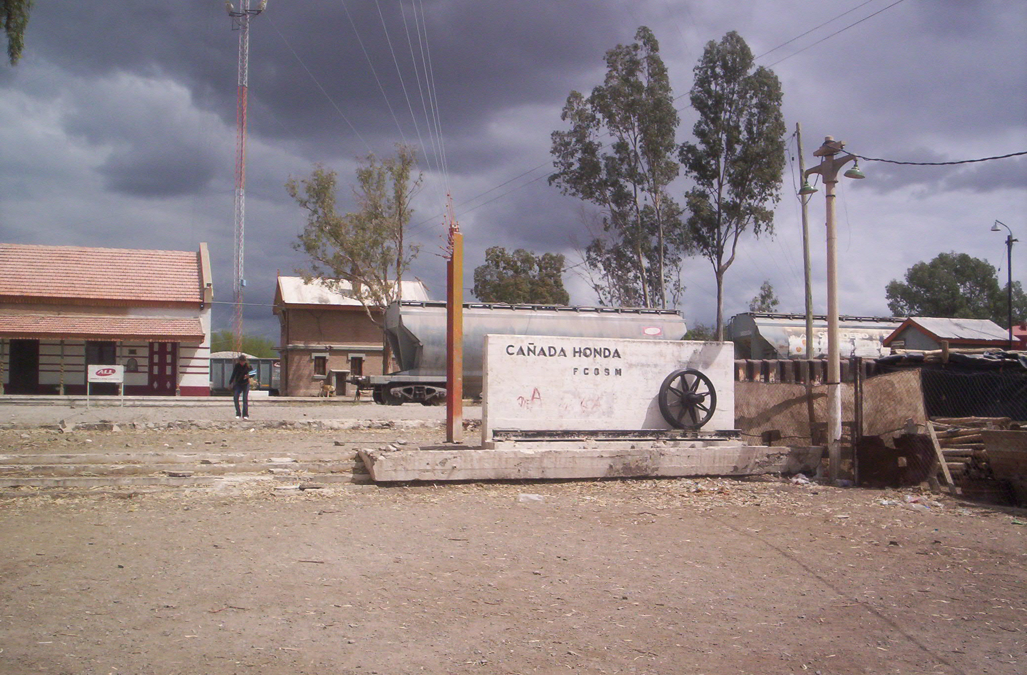 Vista de la estación de trenes de la localidad de Cañada Honda, provincia de San Juan, Argentina